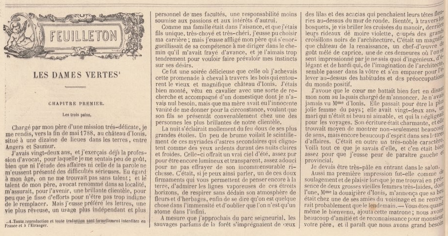 "Les Dames vertes", de George Sand, roman fantastique paru en feuilleton dans l'hebdomadaire d'actualité français "Le Monde illustré" en 1857. Première page du premier épisode paru dans le numéro du 18 avril 1857, pages 6-7. Détail du numéro numérisé en mode image sur Gallica (portail de la Bibliothèque nationale de France). Document mis en ligne le 6 novembre 2012.